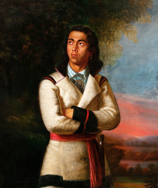 Portrait de Zacharie Vincent par Antoine Plamondon « En 1838, Antoine Plamondon trouva le temps de peindre un remarquable portrait, le Dernier des Hurons, qui eut beaucoup d’impact. » – biographi.ca